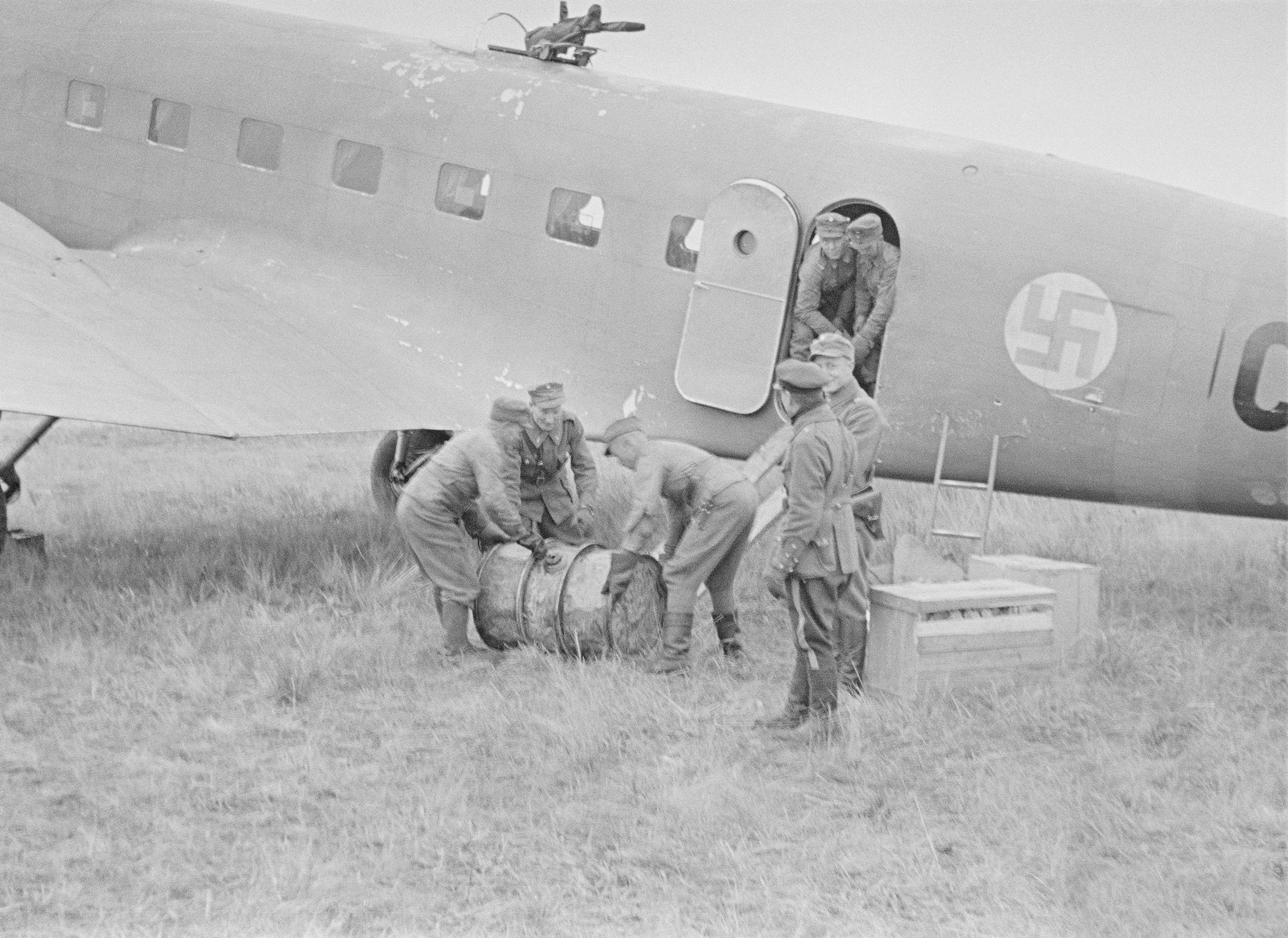 Bensiinitynnyreitä nostetaan kuljetuskoneeseen. (Kuvassa on Douglas DC-2 "Hanssin-Jukka"). Kuvauspaikka: Äänislinnan valtauksesta